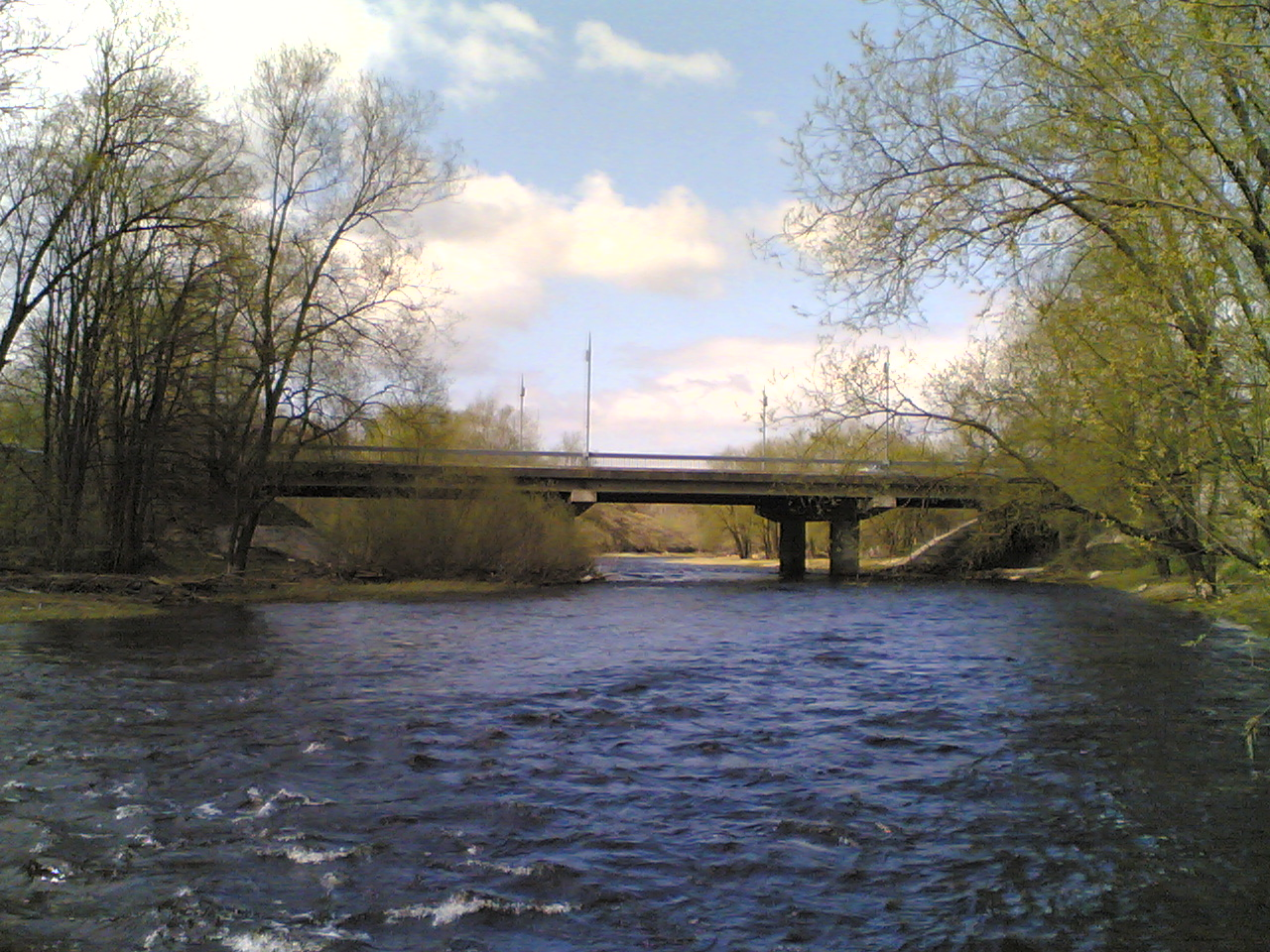 Кузнецкий мост через реку Пскову в Пскове Kuznetsk bridge over the Pskova river in Pskov